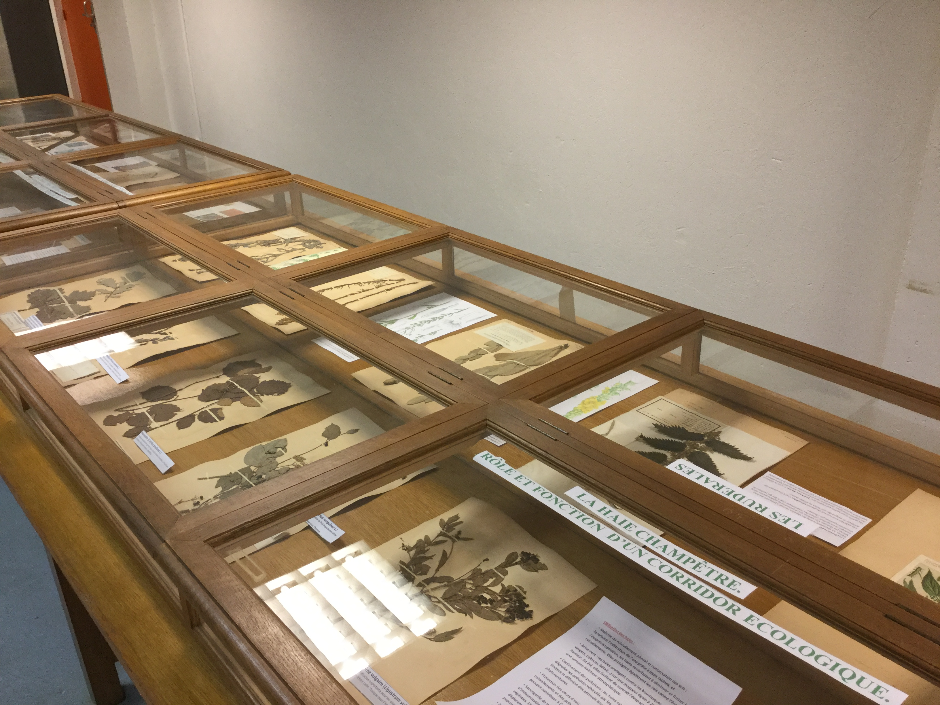 Herbiers au salle d'exposition